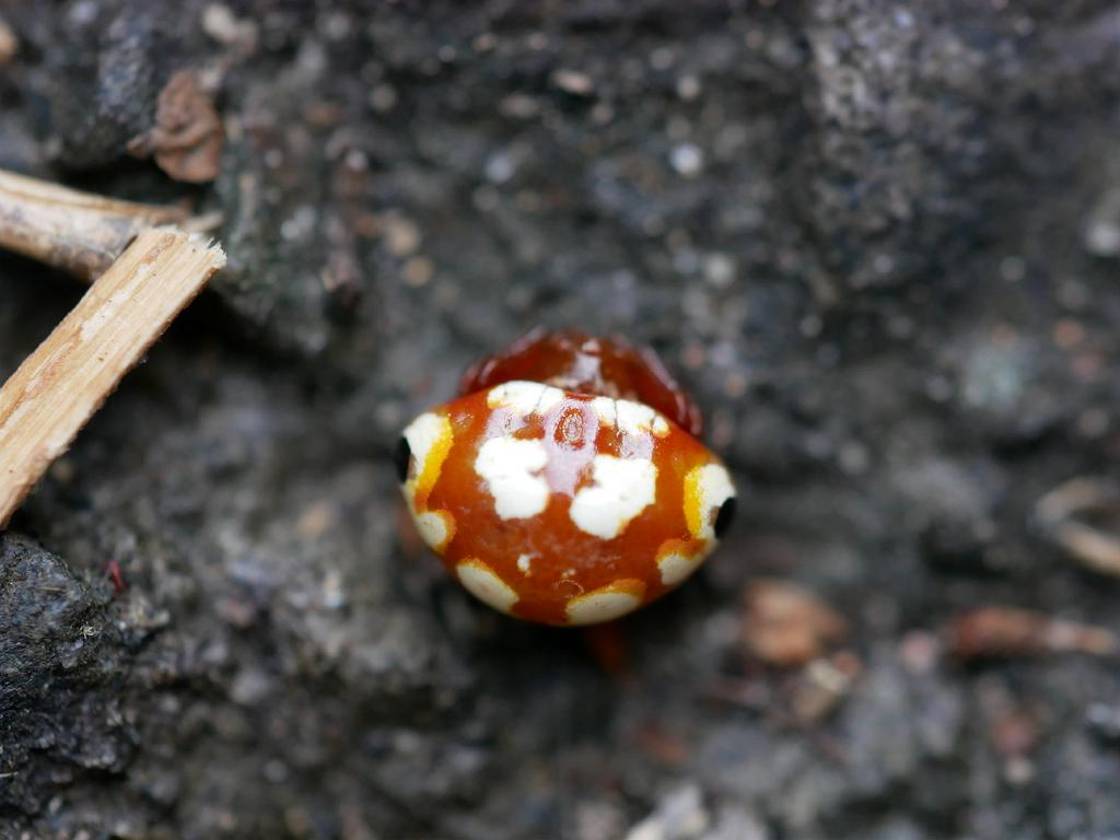 2019/08/10 和歌山県田辺市：Tanabe City. Wakayama Pref. Japan